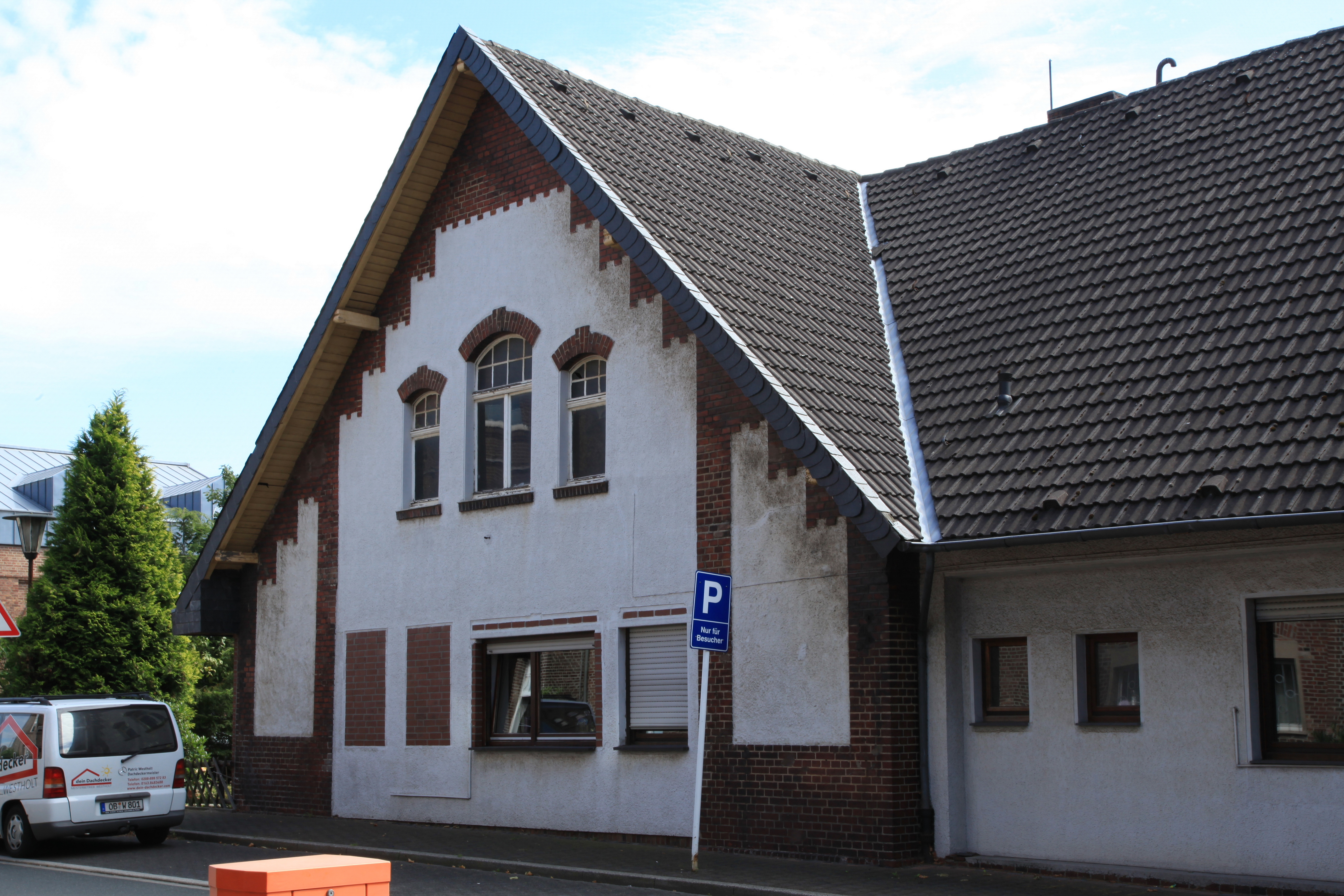 Verbliebenes Torhaus der Zeche Rheinbaben, jetzt auf dem Firmengelände von Eurovia Teerbau GmbH NL Bottrop, Rheinbabenstraße 75 in Bottrop. Die Aufnahmen auf dem eigentlich nicht zugänglichen Firmengelände entstanden mit freundlicher Genehmigung der Eurovia Teerbau GmbH.